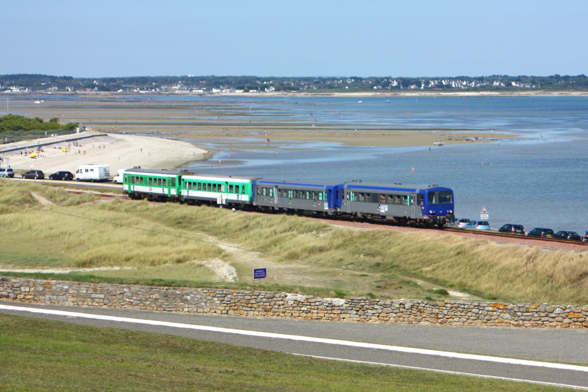 Un train du "tire-Bouchon" au niveau de l'Isthme de Penthièvre, sur la commune de Saint-Pierre-Quiberon